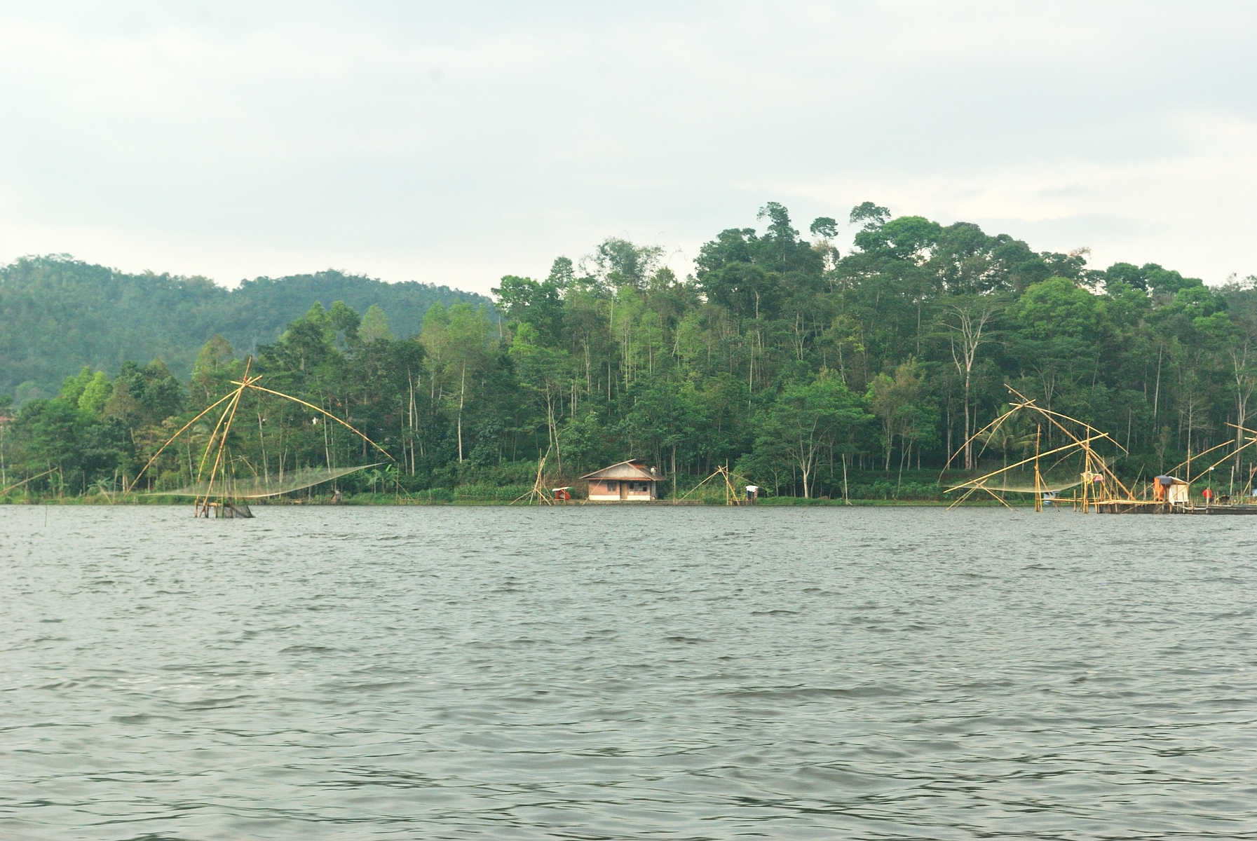 Fischernetze vor einer Insel am Lengkong-See nördlich von Tasikmalaya auf Java, Indonesien